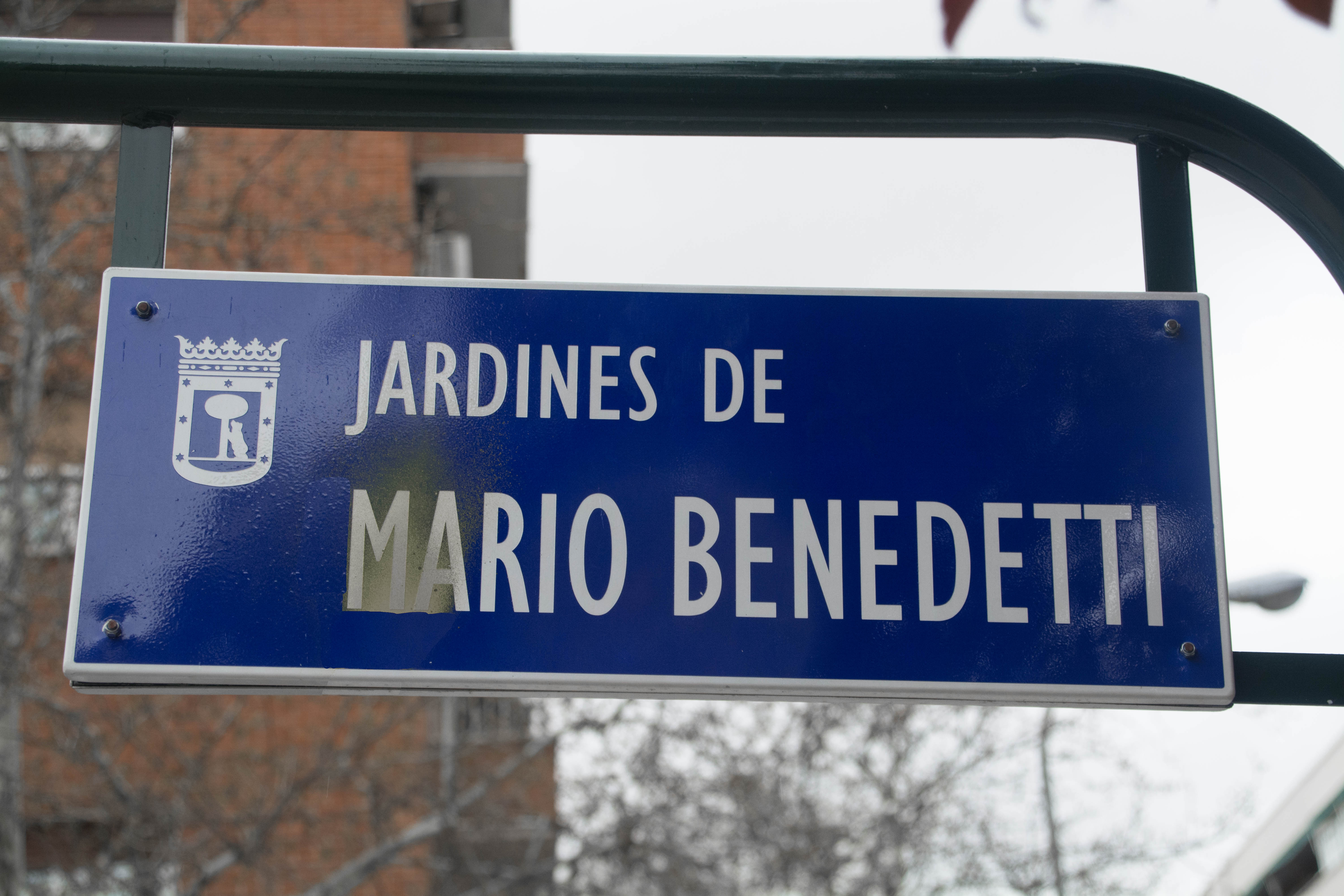 Señal jardines Mario Benedetti, Madrid. 2018